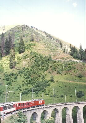 Von Sturm fast zerstörter Schutzwald in der Schweiz bei Sedrun, 1996. Der Schutzwald für die Bahnlinie wurde u. a. durch das Bergwaldprojekt wieder aufgeforstet.